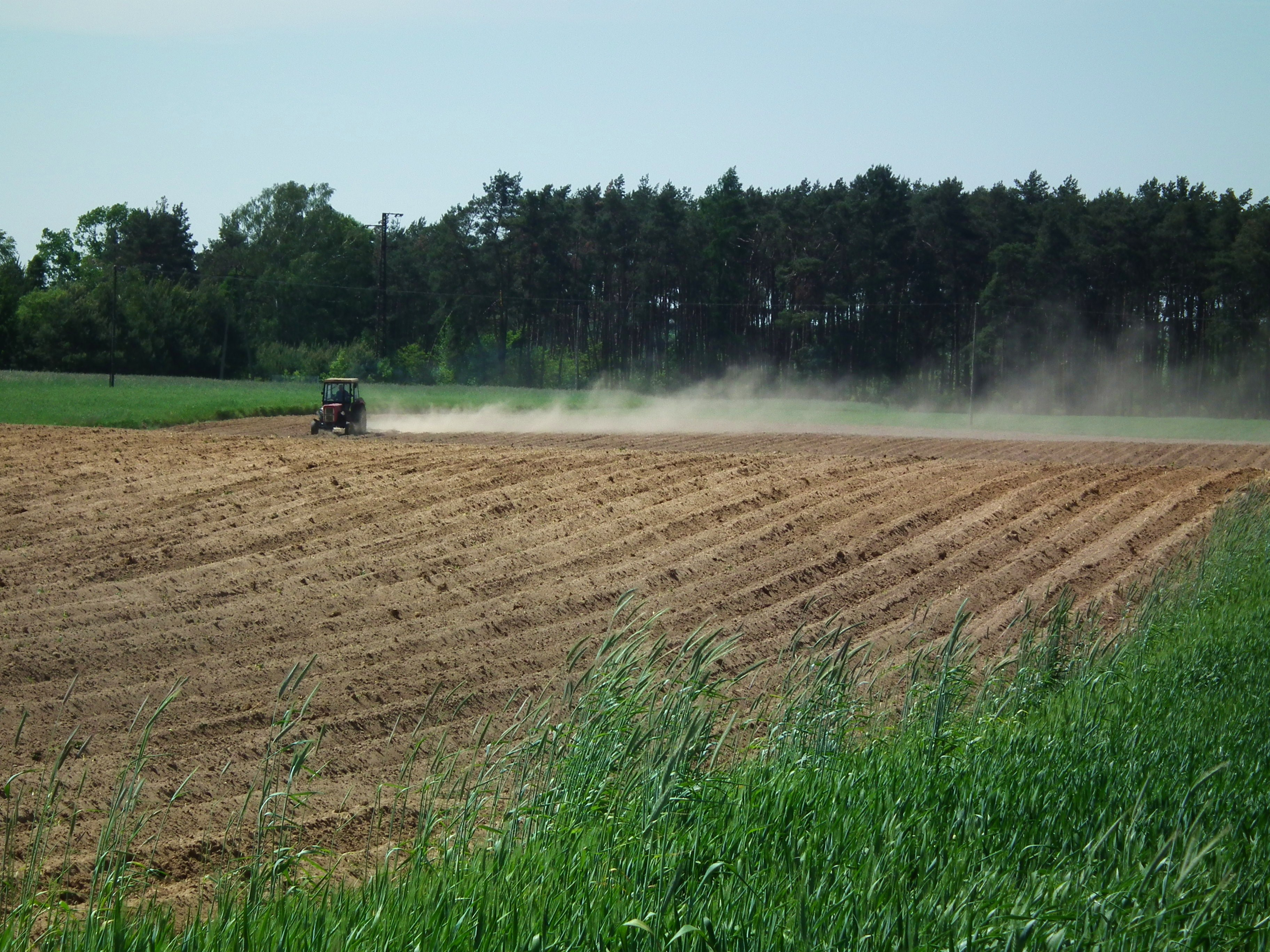 Obszar Natura 2000 Ostoja Rogalińska.